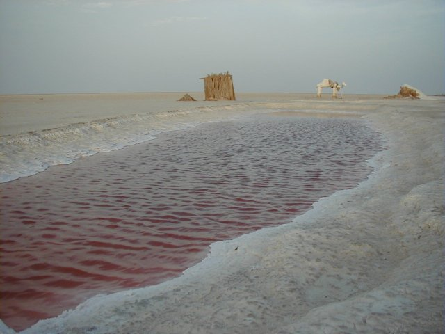 Photo prise en septembre 2004 le long de la route qui joint Douz et Tozeur